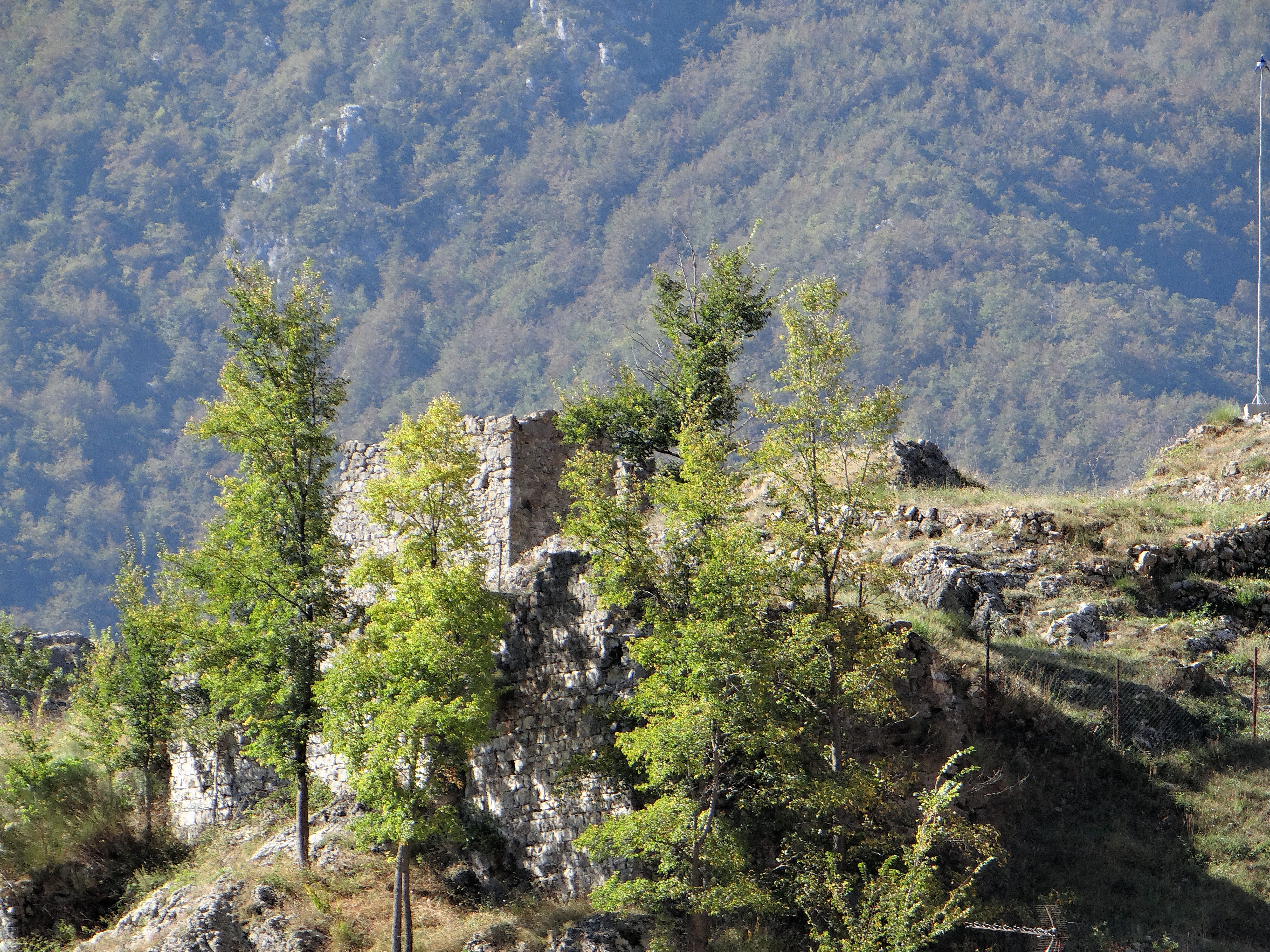 Le Mas - Vestiges du château féodal